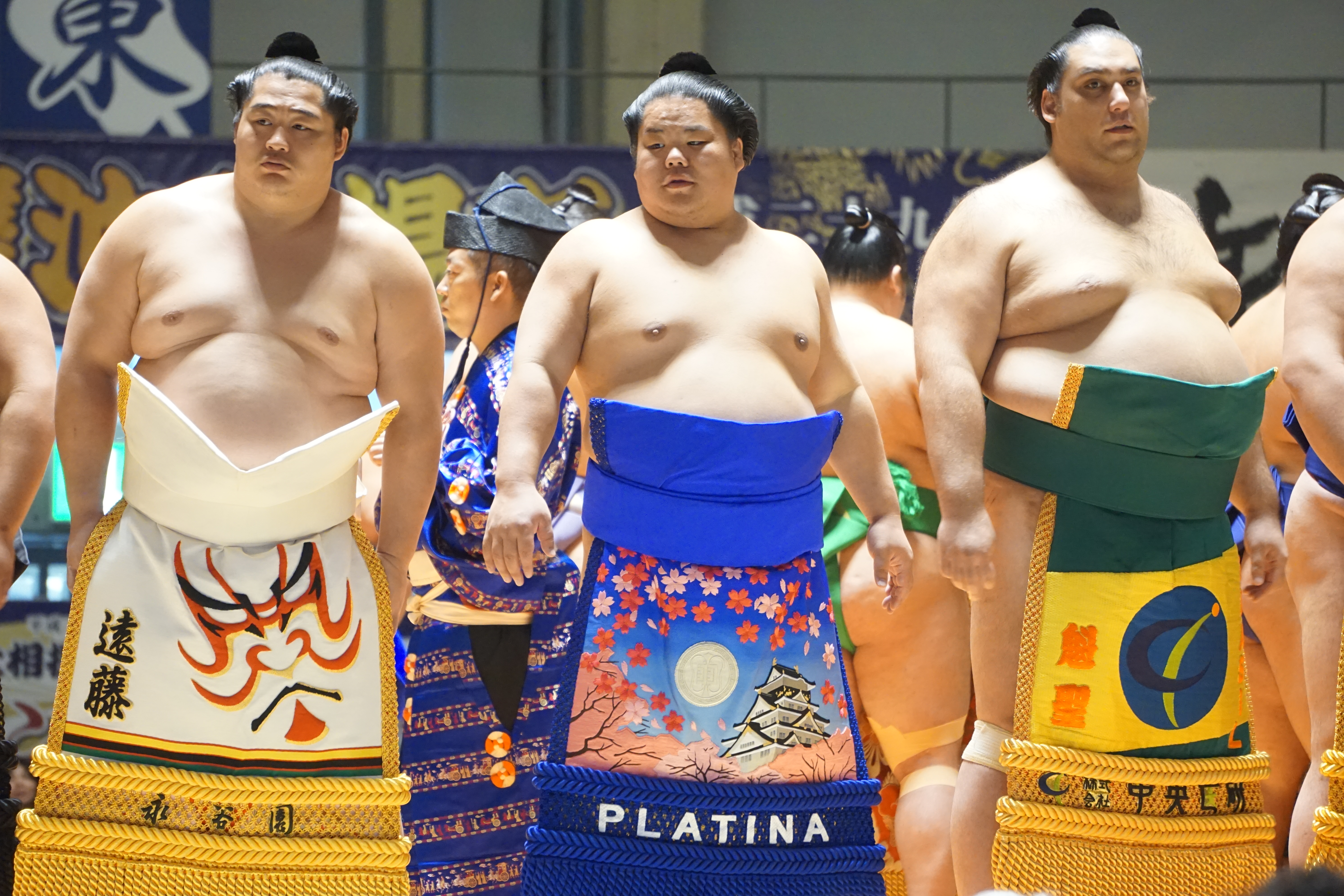 Sumo in Okinawa - 2017